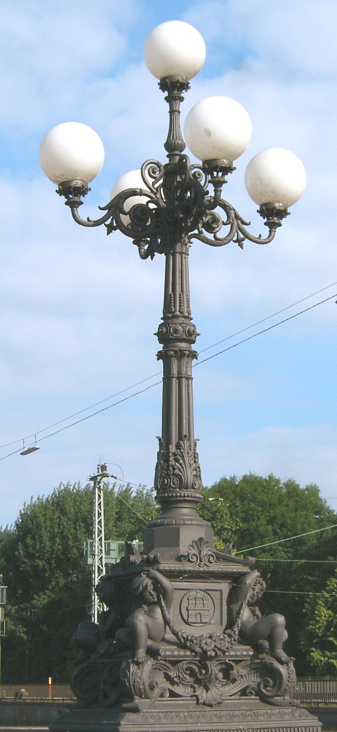 Kandelaber von Carl Börner auf der Lombardsbrücke, die Hamburg-Altstadt mit der Neustadt verbindet. This is a photograph of an architectural monument.